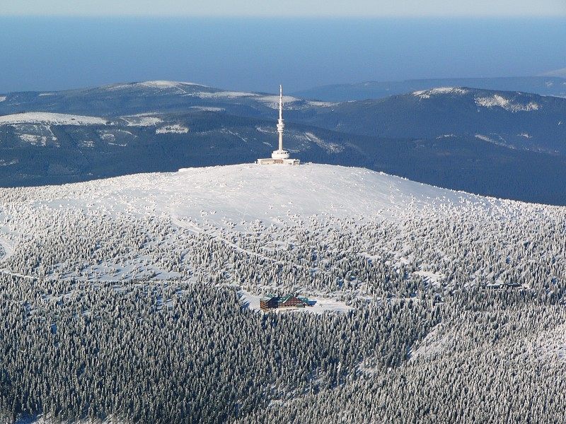 Letecký snímek Pradědu. Foceno z jižní strany.